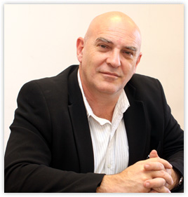 Javier Corcuera